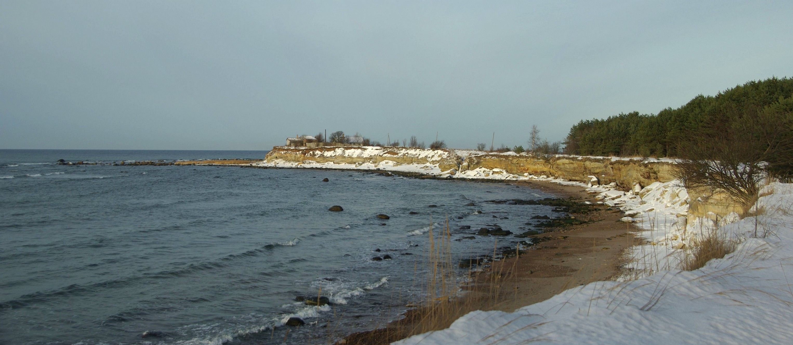 asub Suurupi poolsaarel